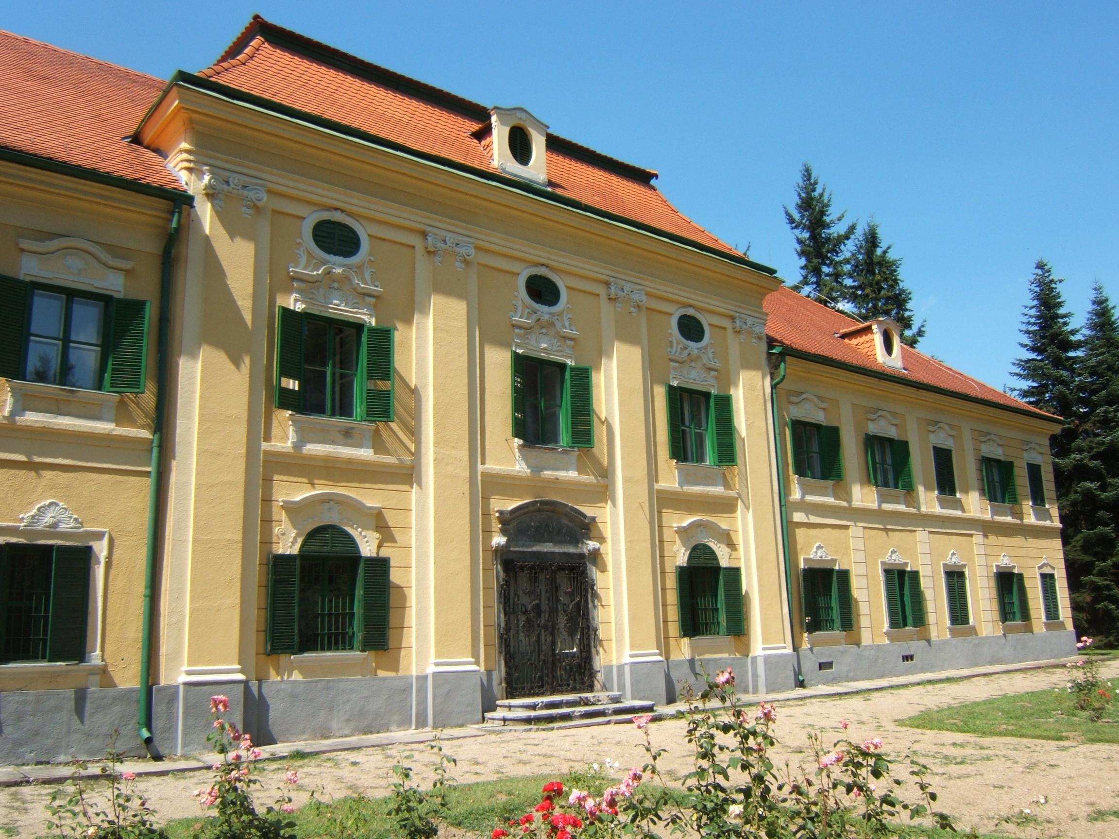 Sellye, kastély